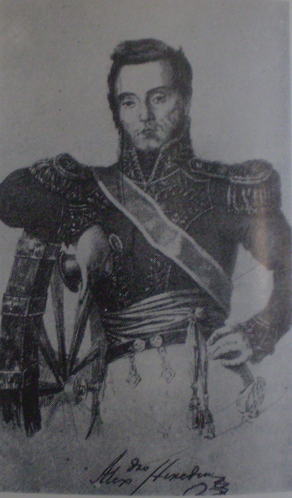 Alejandro Heredia, Litografía de Andrea Bacle. Museo Histórico Nacional. (Fotografía original en el Archivo general de la Nación)Argentina